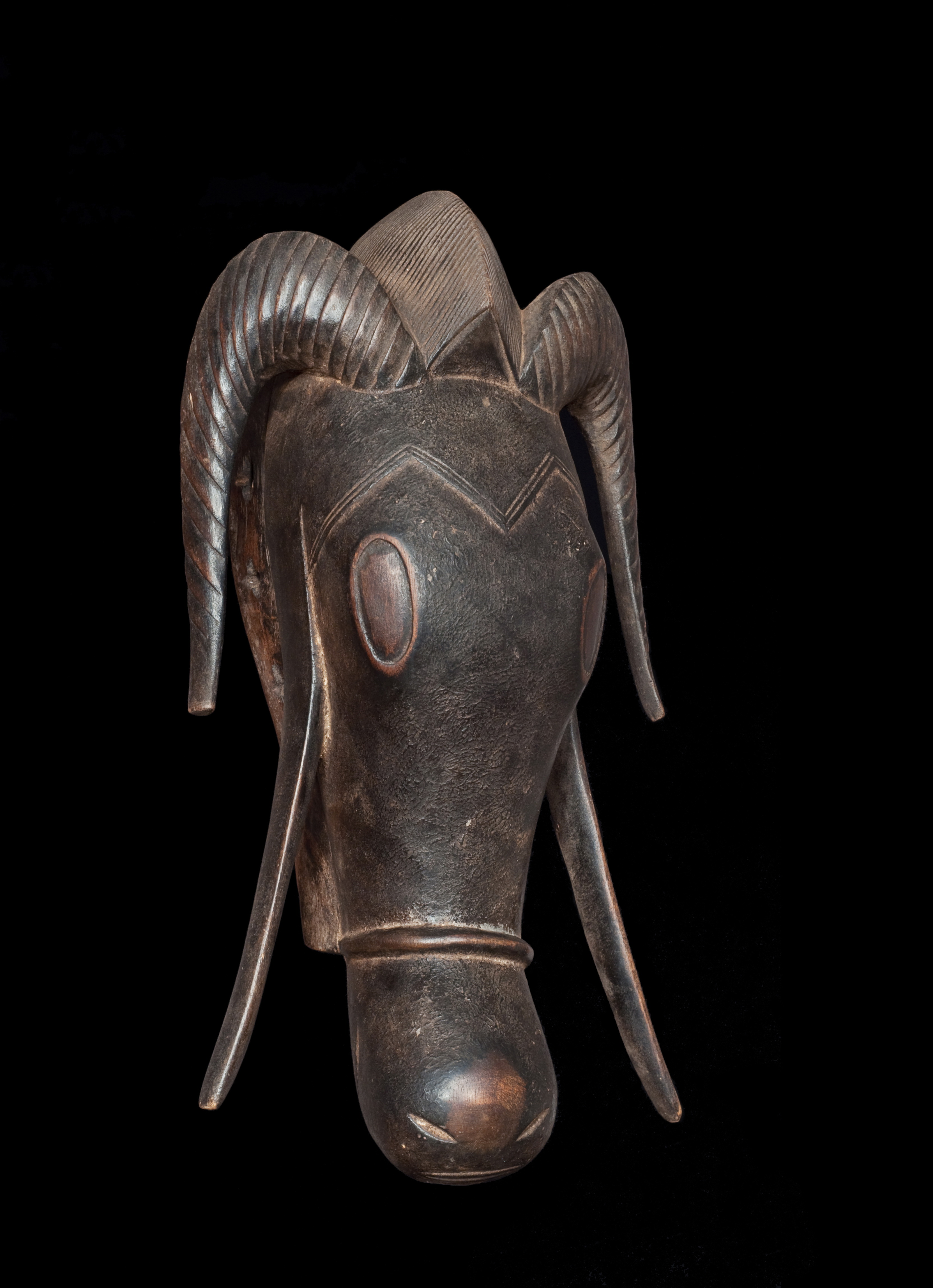 Masque baoulé animalier représentant un bélier